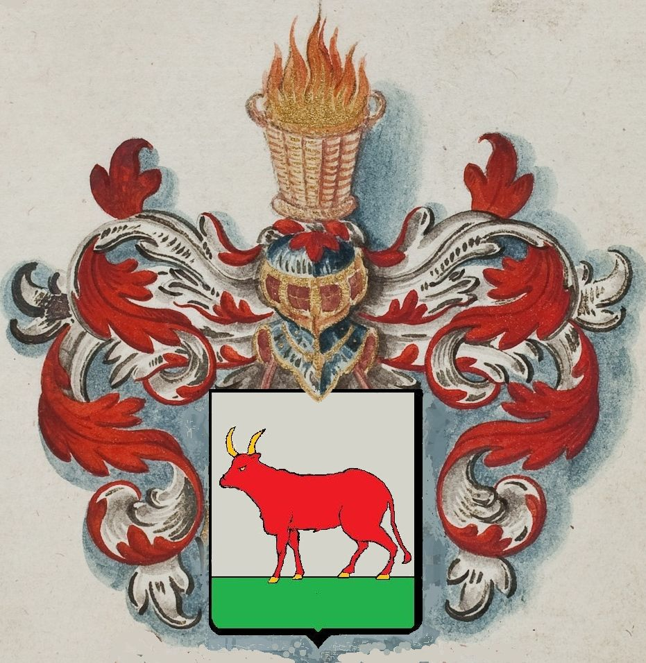 Familiewapen Ernst Brinck